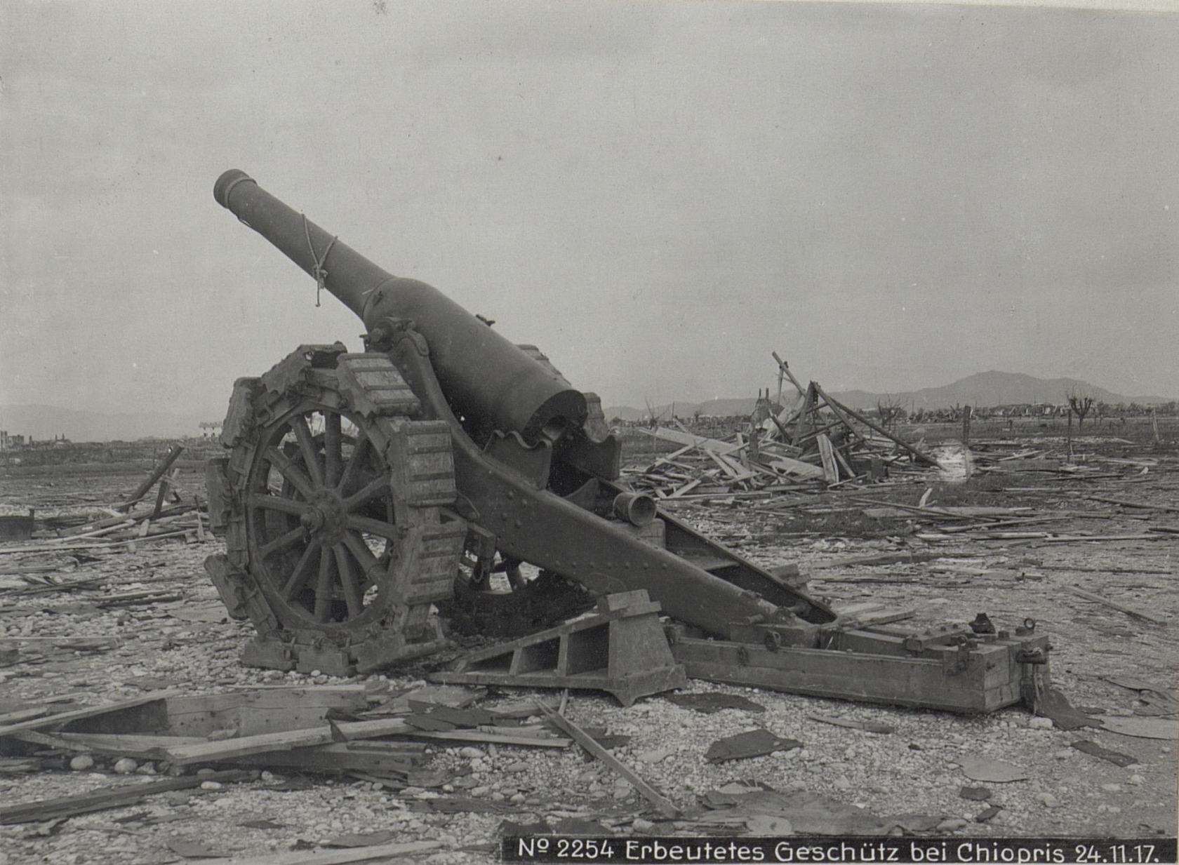 Erbeutetes Geschütz bei Chiopris 24.11.17.